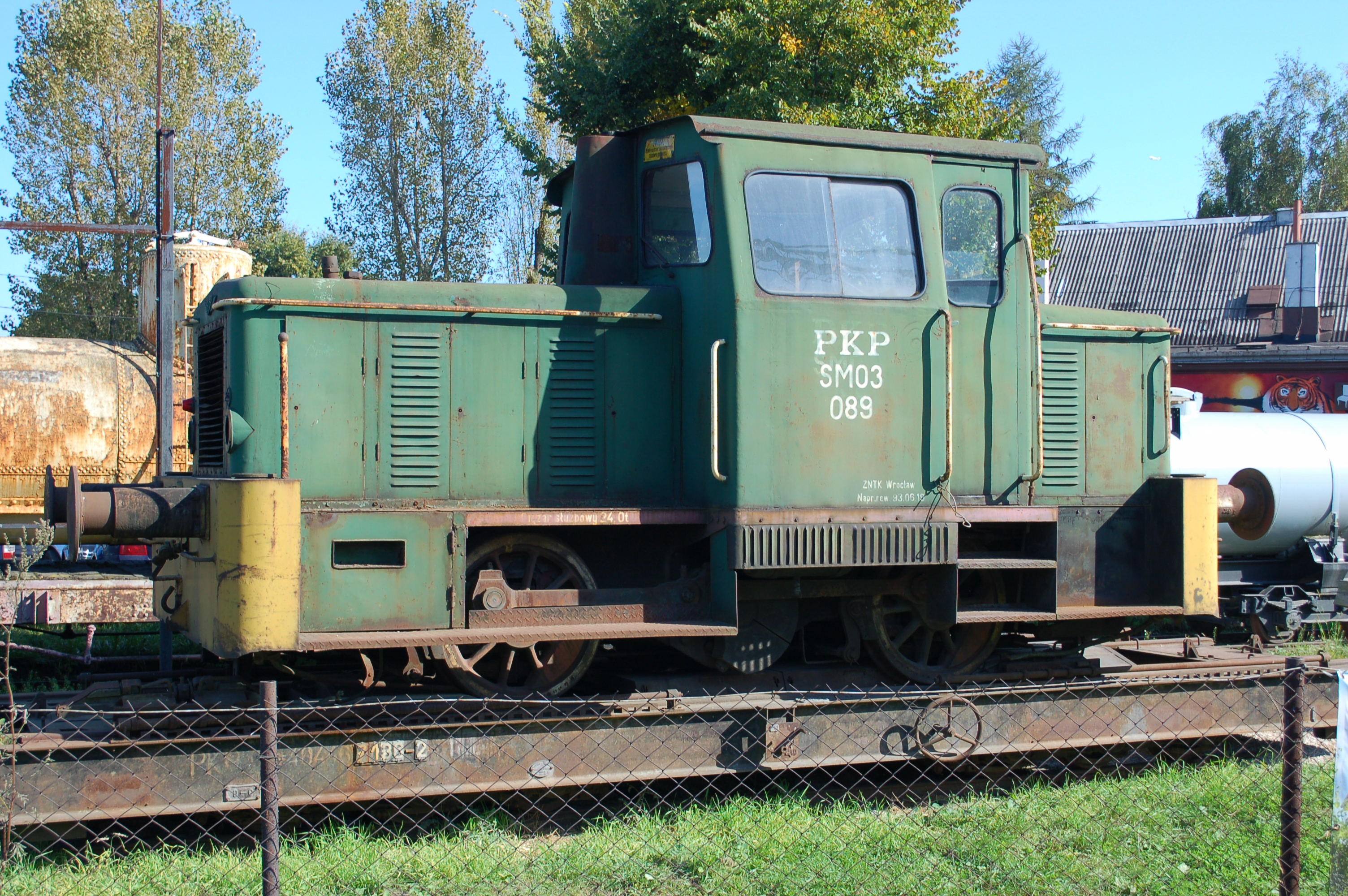 Rolling Stock der Schmalspurbahn in Piaseczno, Masowien. Hier eine Normalspurdiesellok (PKP Klasse SM 03) auf einem Schmalspurniederflurwagen